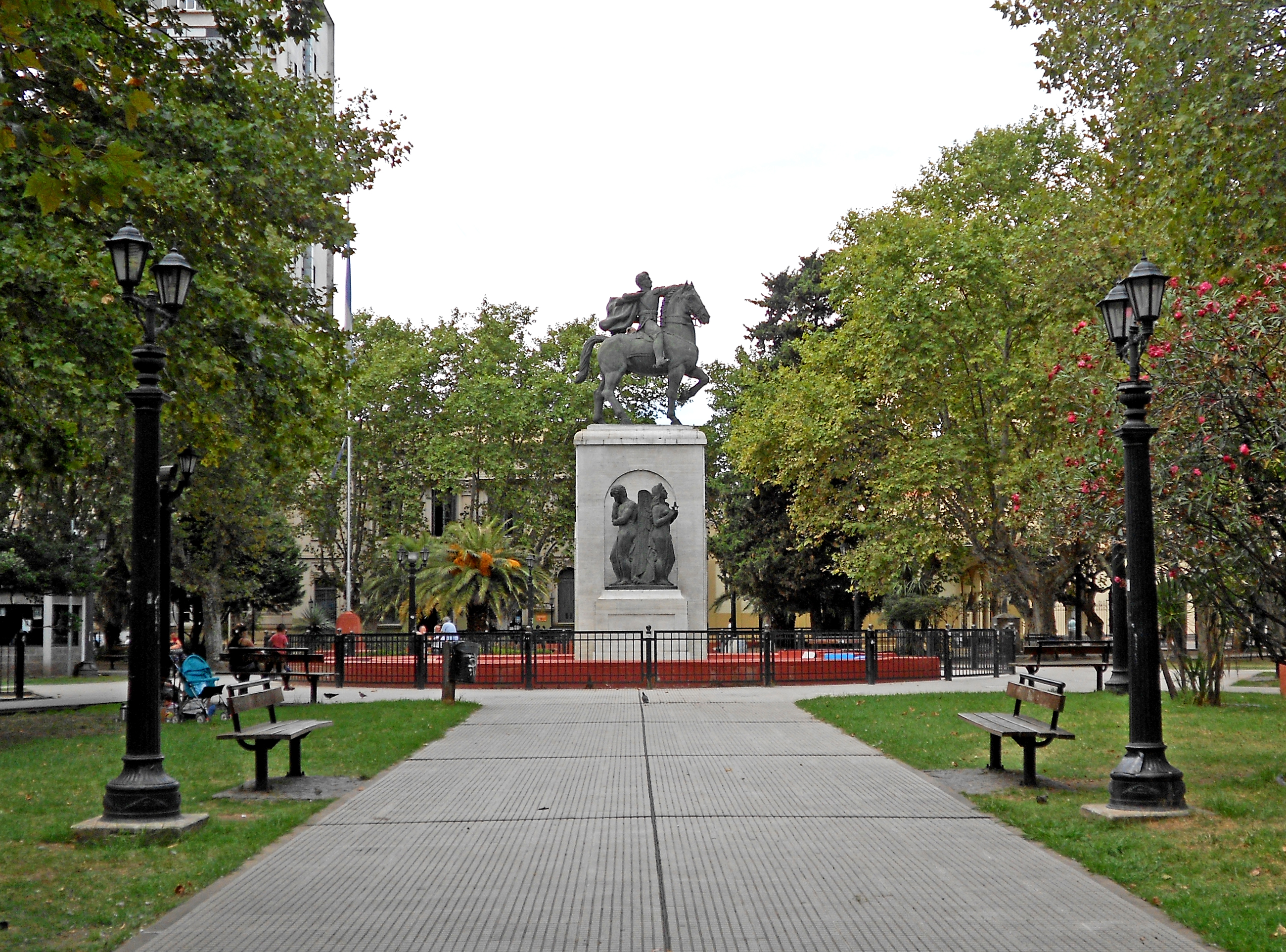 Vista de la Plaza San Martín de la ciudad de Quilmes.